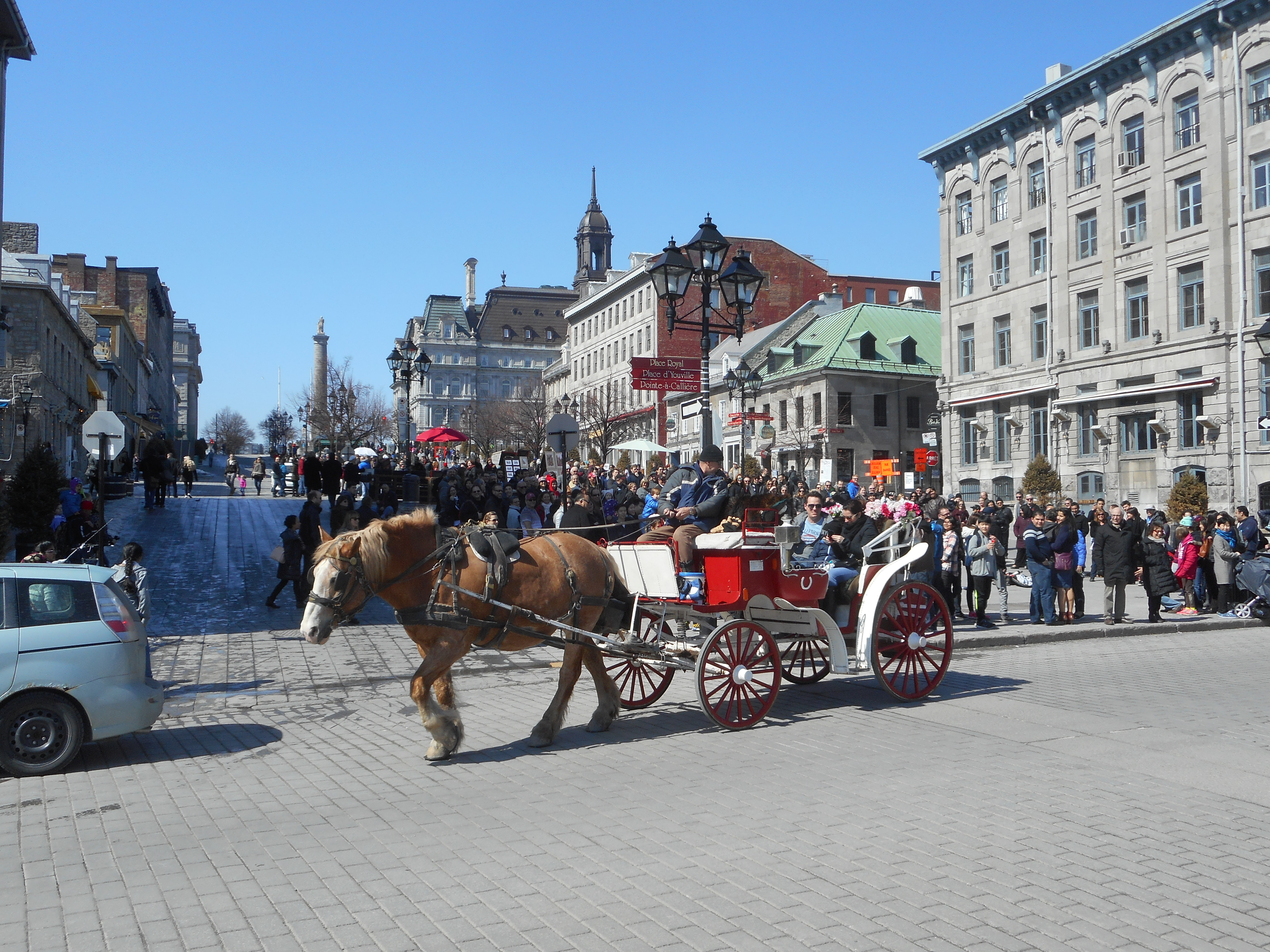 Place Jacques-Cartier, Montréal